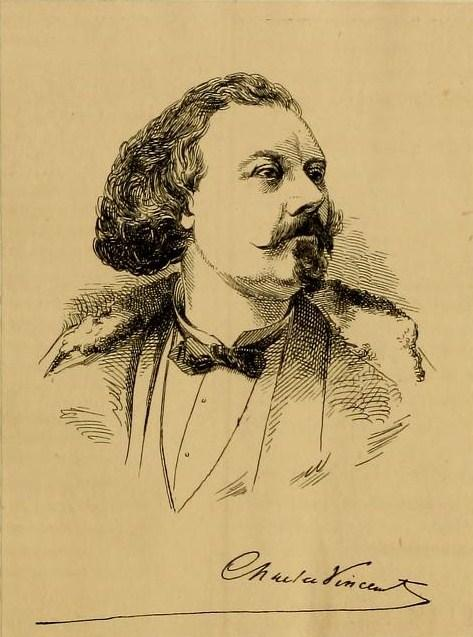 Portrait du chansonnier et goguettier Charles Vincent.